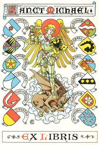 Exlibris "Sanct Michael" für den Verein St. Michael, Verein deutscher Edelleute zur Pflege der Geschichte und Wahrung historisch berechtigter Standesinteressen. Abgebildet sind der hl. Michael und die Wappen der Familien von Aufseß, von Froben (Frobenius), von Guttenberg, von Künsberg, von Minnigerode, von Münster, von Berchem, von Gaisberg, von Kohlhagen, von Lindenfels, von Müllenheim, von Tautphoeus. (Quelle: [1])